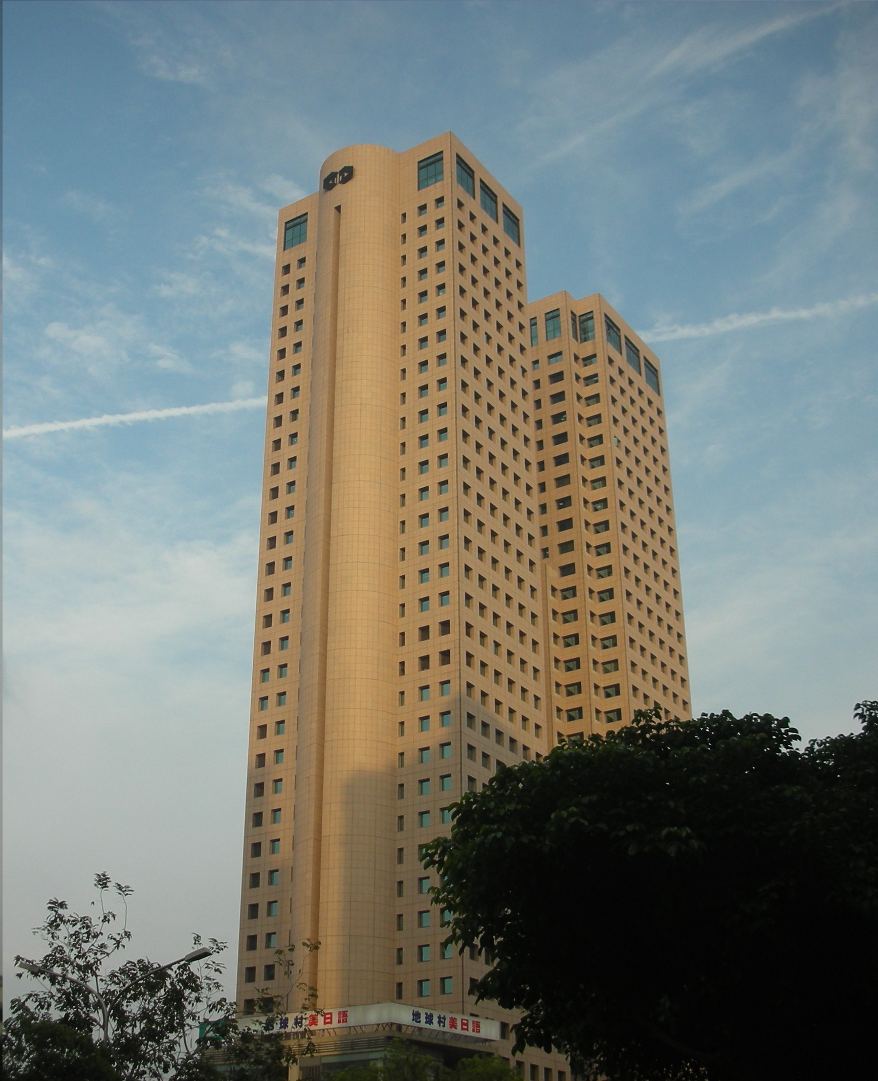 台中市西區龍邦世貿大廈，為台中市第四高樓。